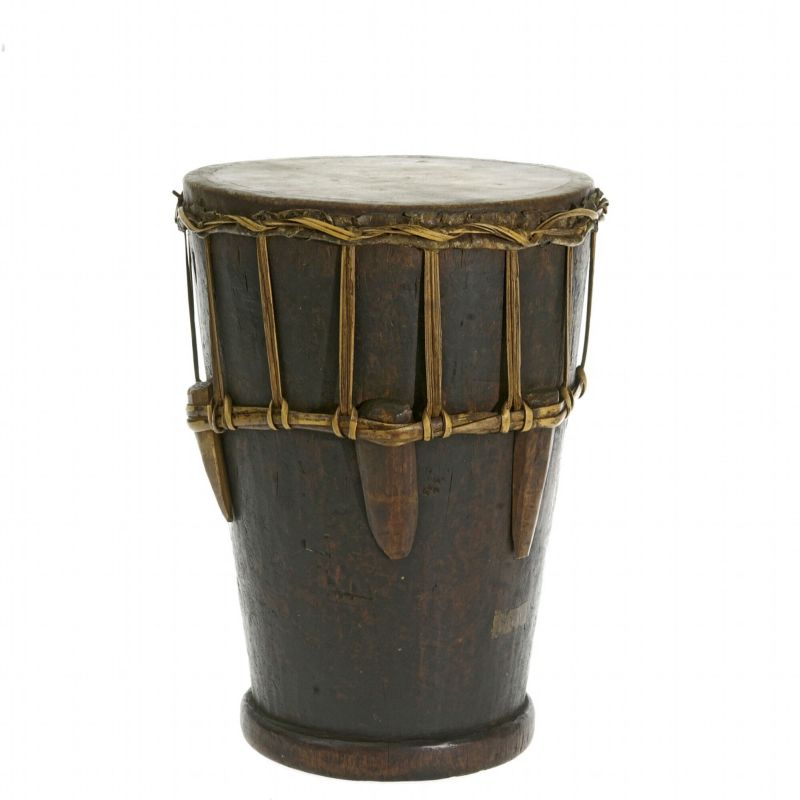 Slaginstrument. Enkelvellige cilindrische trom Unknown language: Tiwah